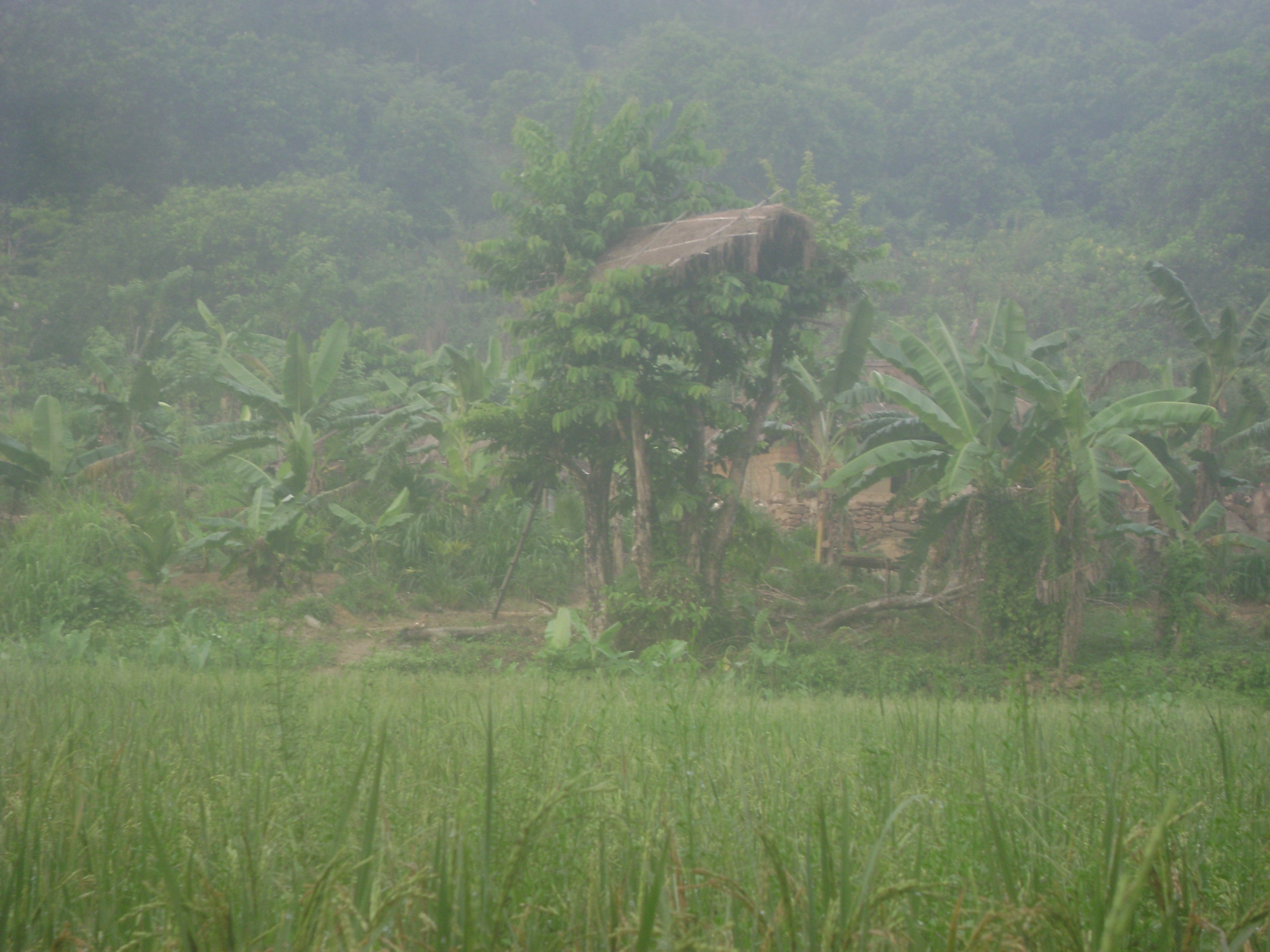 ആറളം വന്യജീവി സംരക്ഷണ കേന്ദ്രത്തില്‍ നിന്ന്